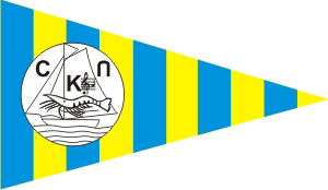 Grímpola del Club Náutico de Cala Gamba